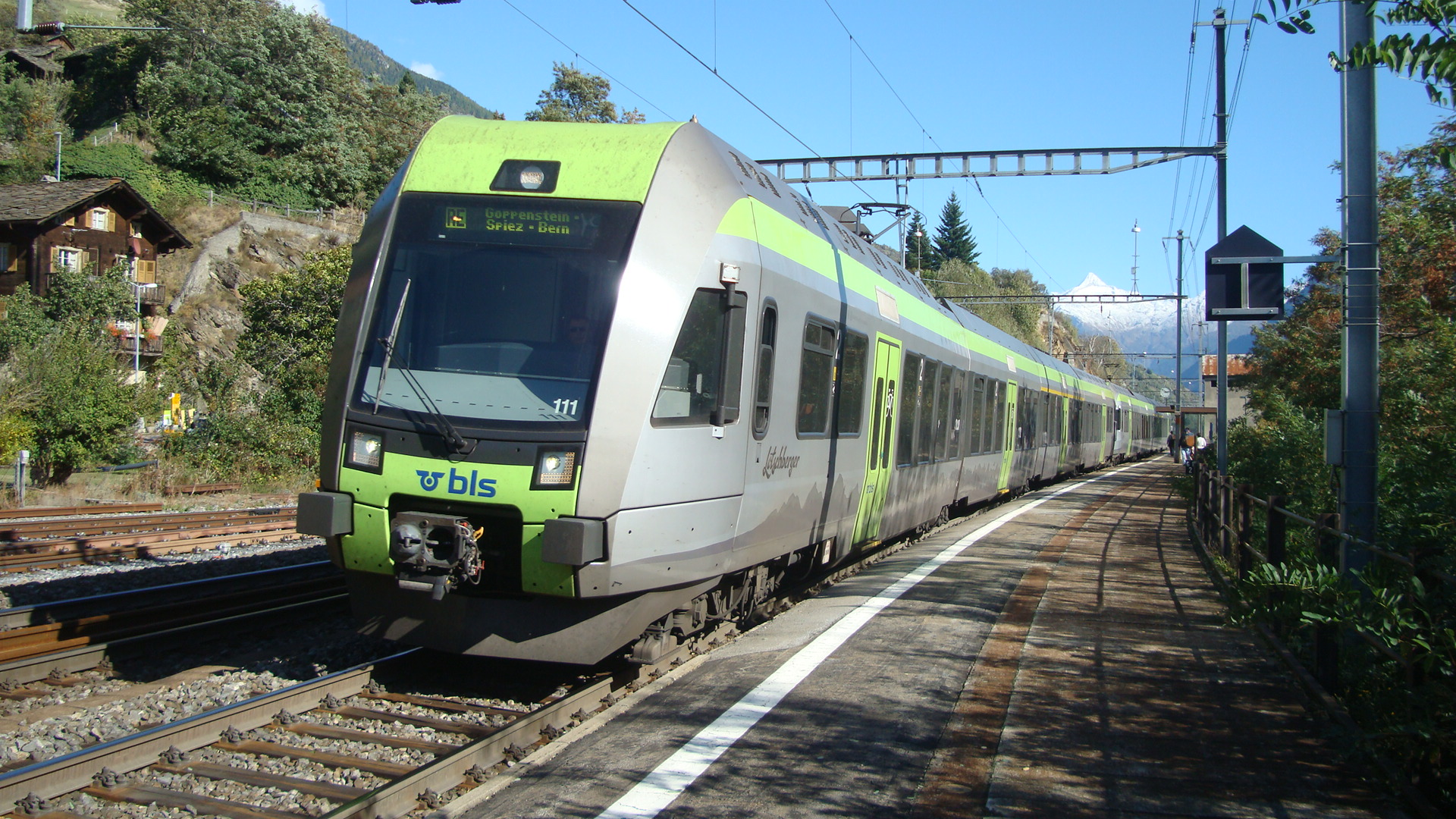 RE 3274 Lötschberger der BLS von Brig nach Spiez (-Bern) über die Lötschbergstrecke in Ausserberg.